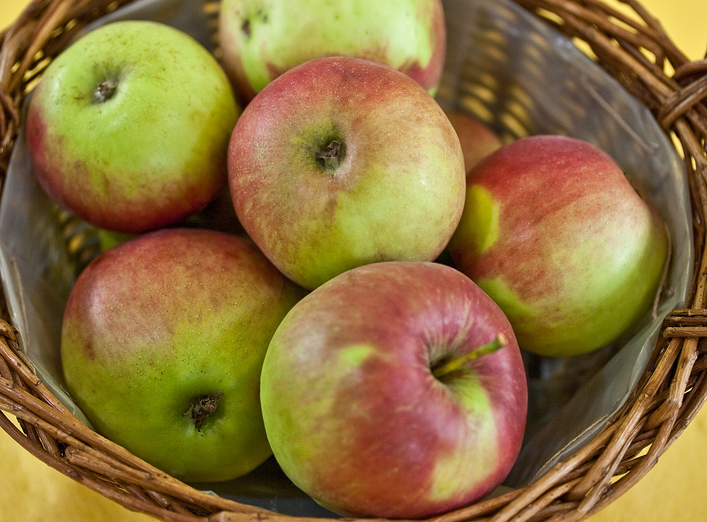 Der Jonathan ist eine Apfelsorte